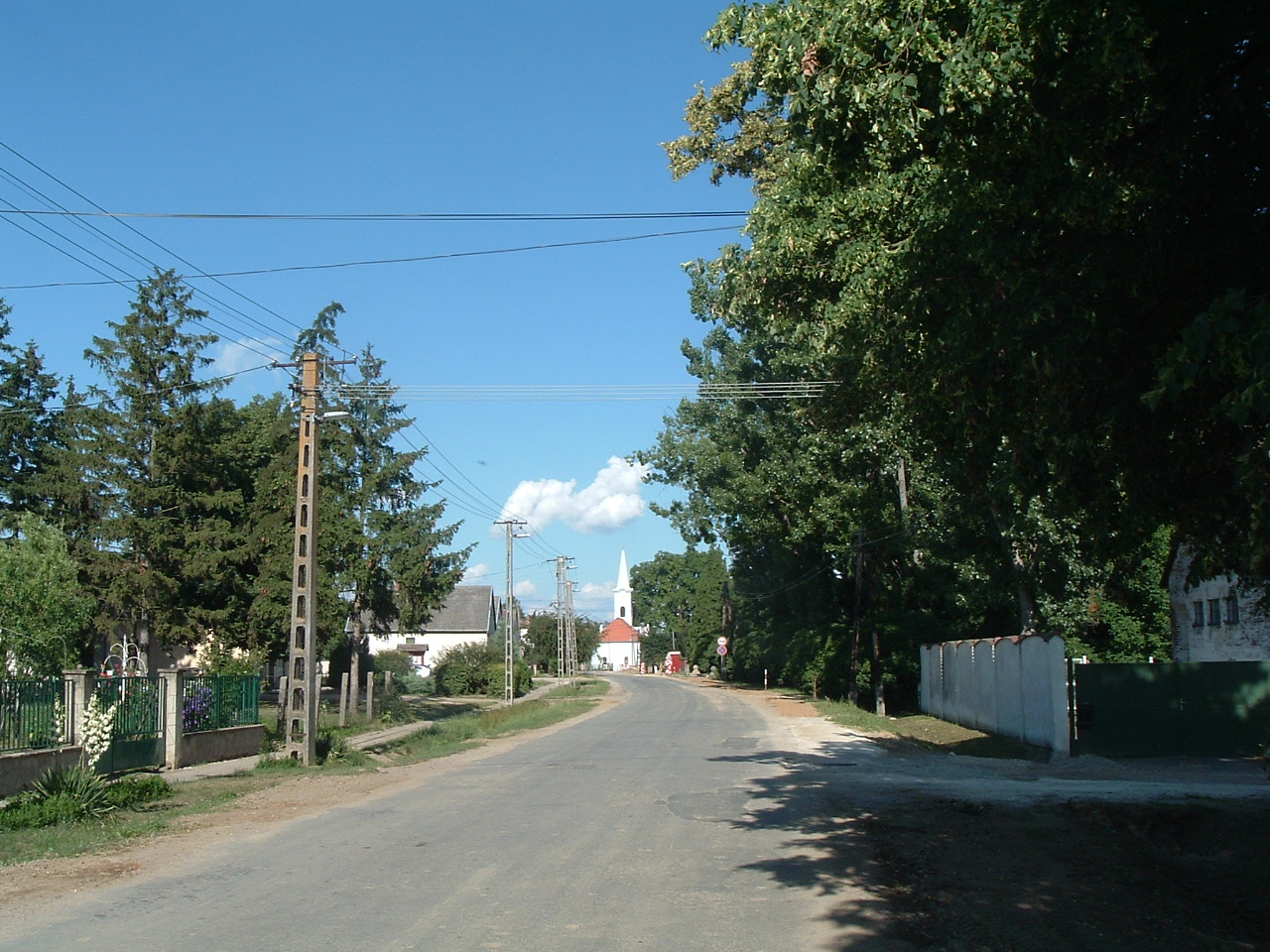 Nemeskolta, Hungary